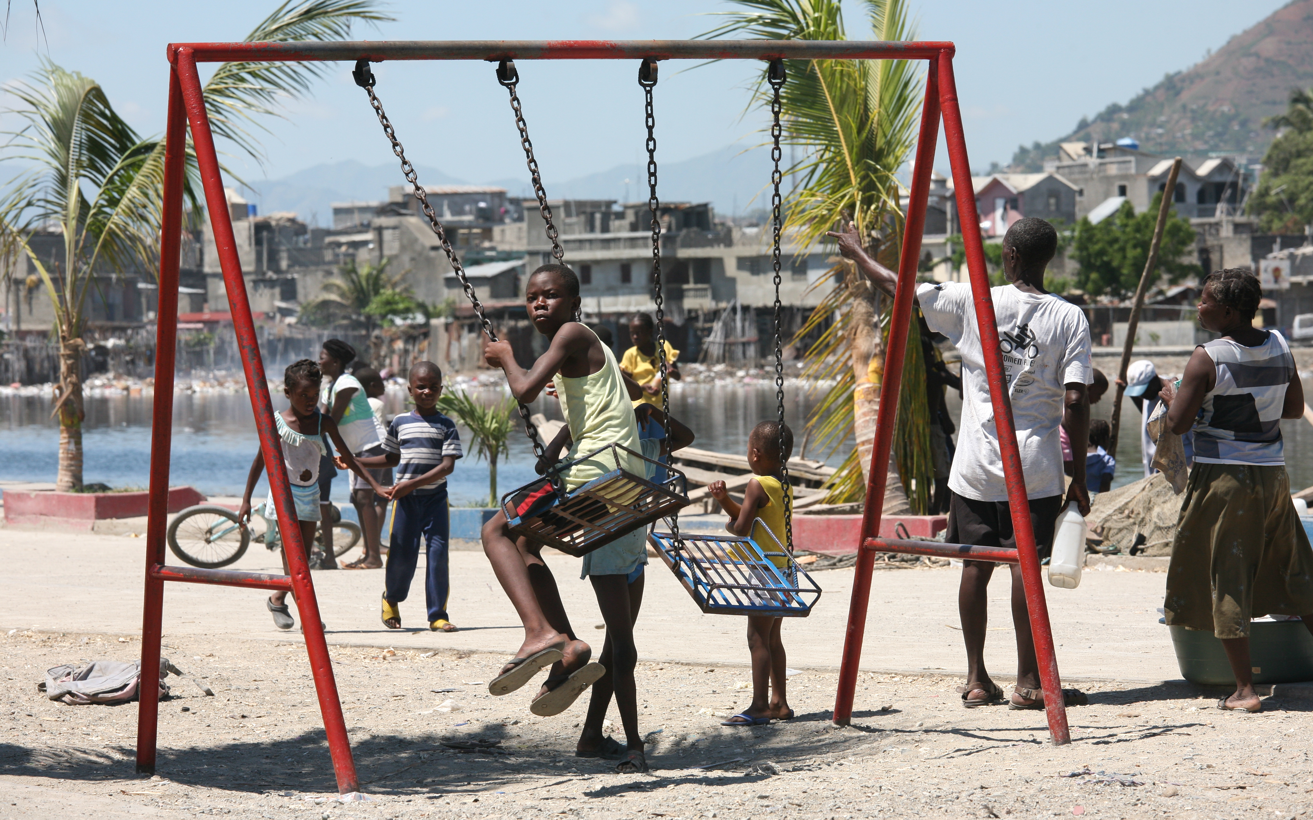 Shada, Cap Haitien - Haiti